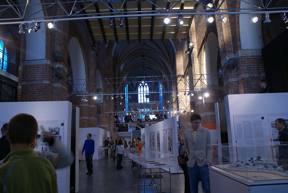 Wrocław Stare Miasto, ul. Bernardyńska 8 - dawny kościół klasztorny pw. św. Bernardyna, obecnie Muzeum Architektury (zabytek A/1298/16)